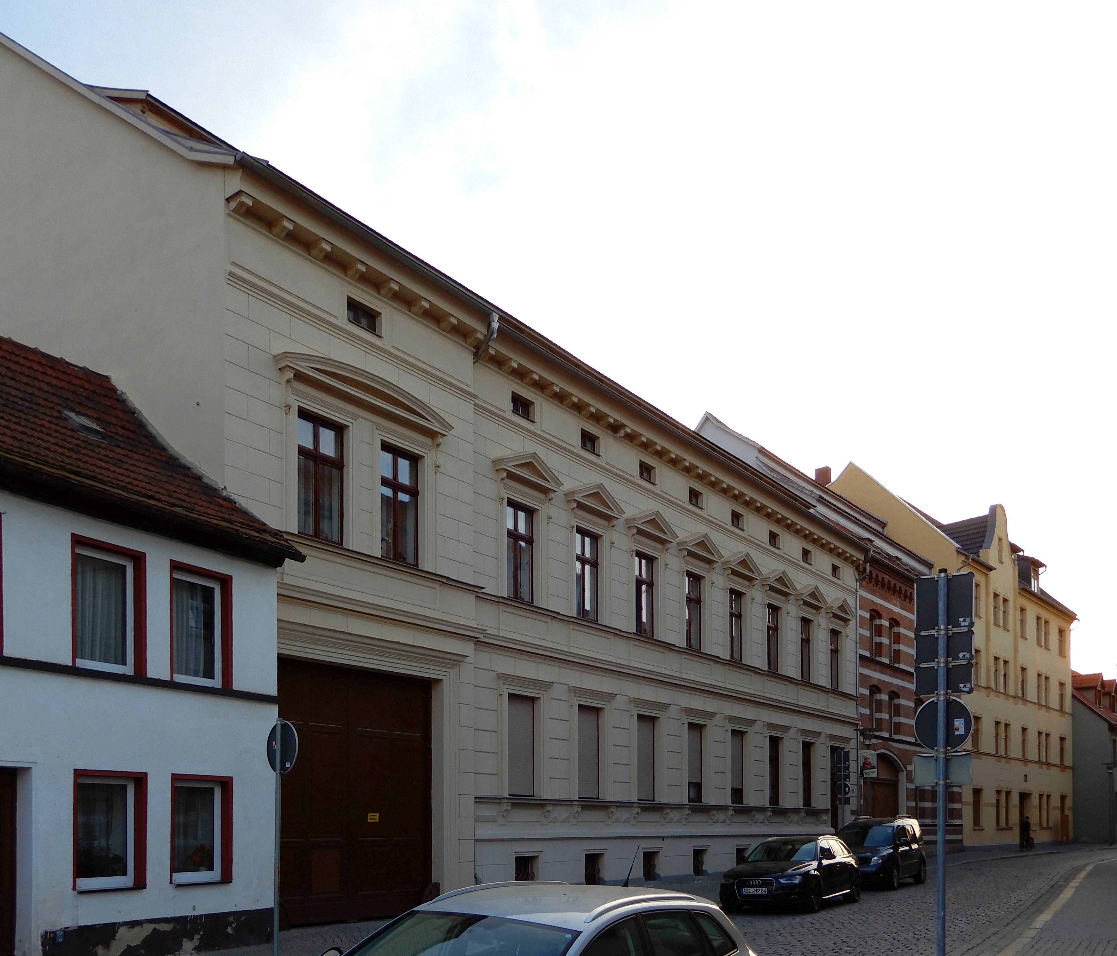 Gebäude Ritterstraße 2-4 in Aschersleben